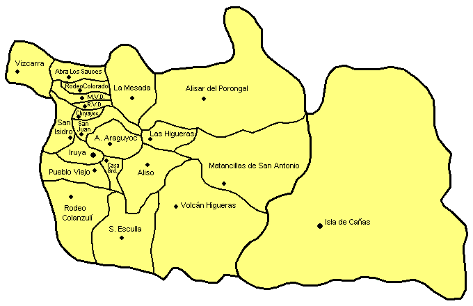 Departamento Iruya in der Provinz Salta in Argentinien